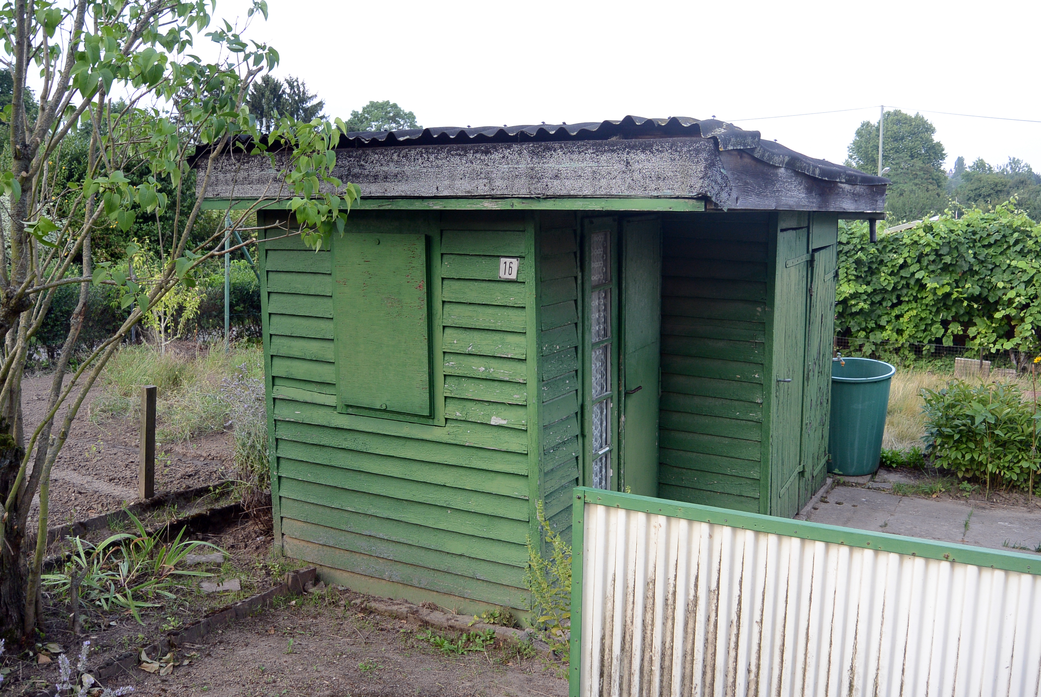 Frankfurt am Main, Siedlung Römerstadt: Typisierte Gartenlaube in einem Mustergarten, entworfen für das Projekt Neues Frankfurt (1925–1930). Architektin: Margarete Schütte-Lihotzky.